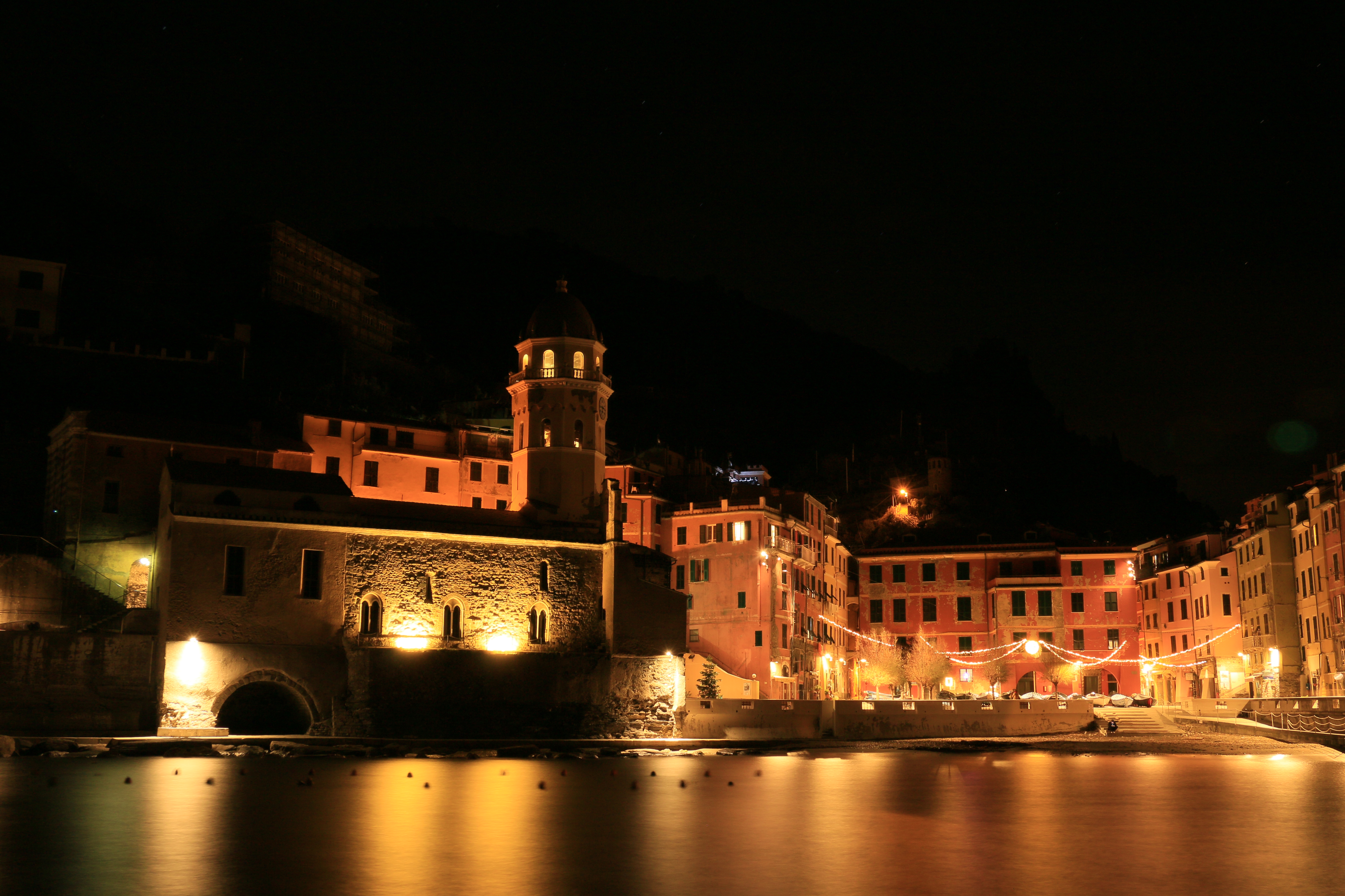 中文（中国大陆）: 韦尔纳扎的圣玛加利大堂